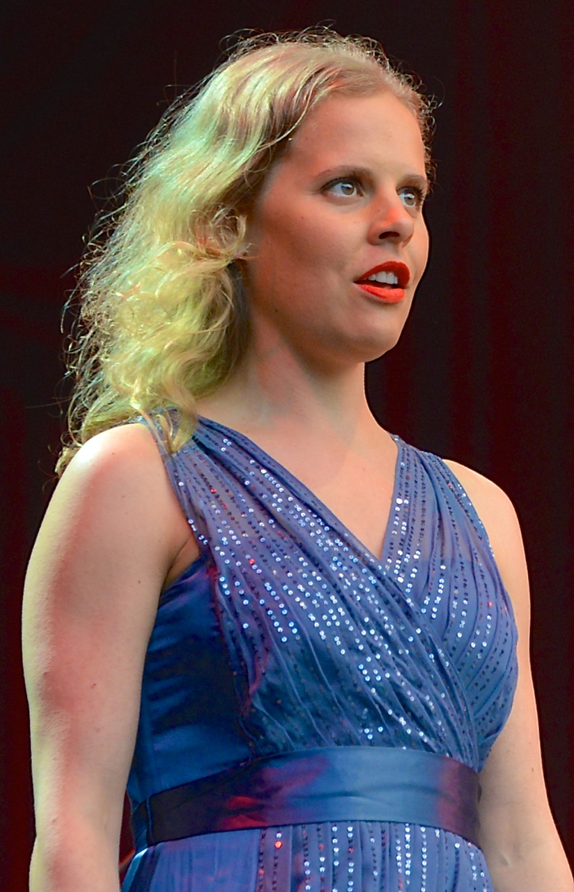 Sara Widén på en konsert på Gustav Adolfs torg under Stockholms Kulturfestival den 17 augusti 2013.